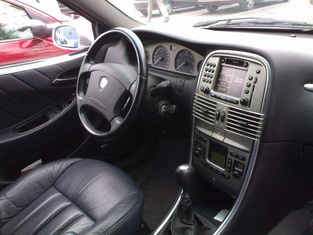 Lancia Lybra - wnętrze wersji Executive